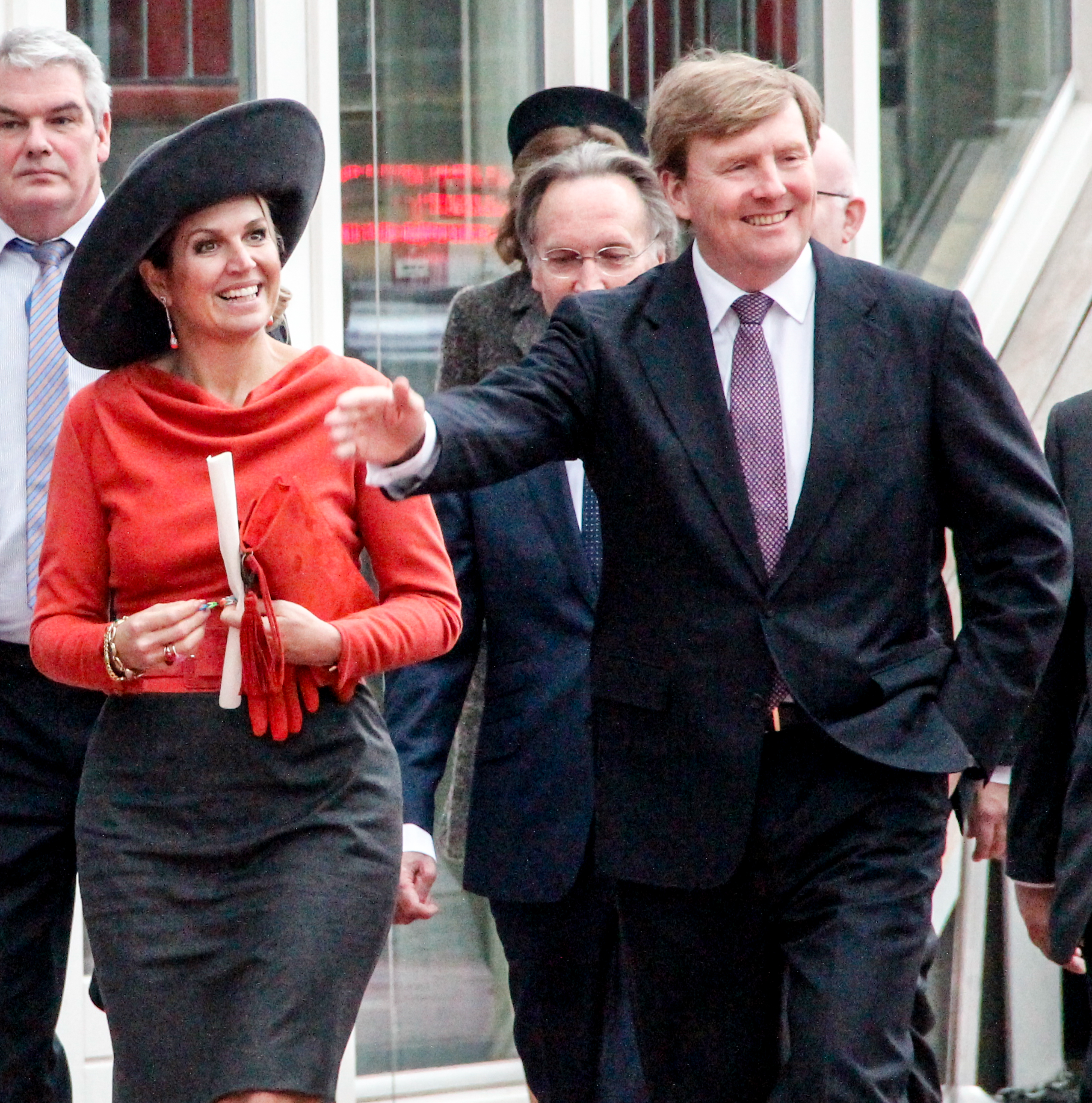 Bezoek Koning Willem-Alexander en Koningin Maxima aan Emmen in 2015